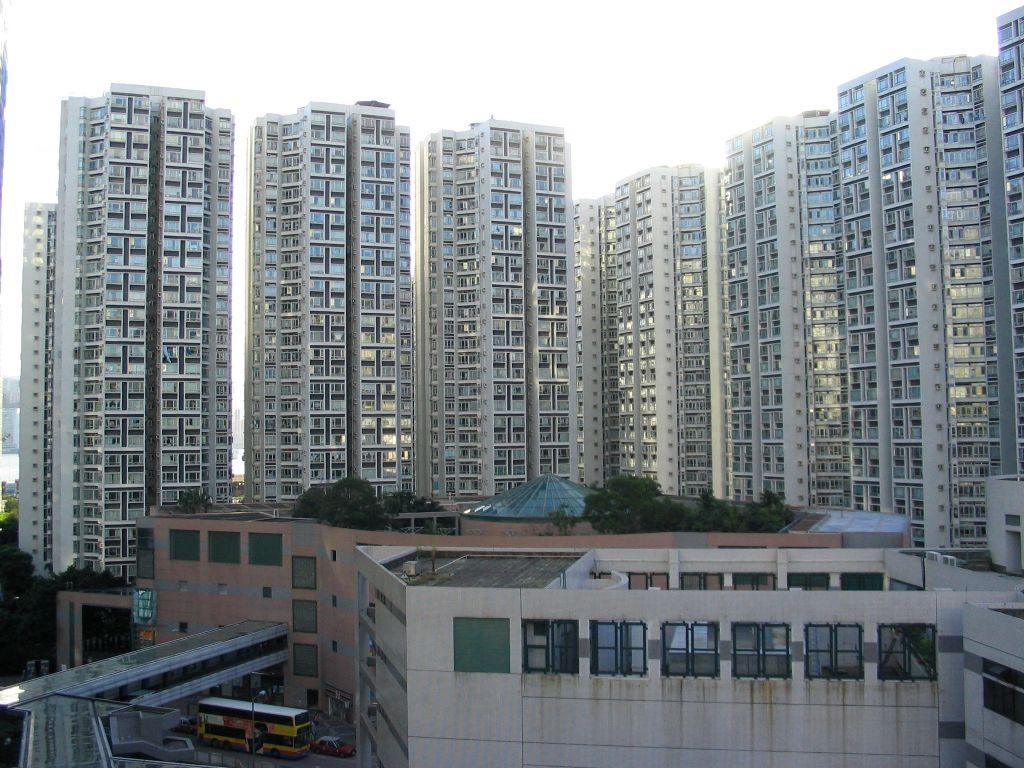 藍田-麗港城 Laguna City, Lam Tin